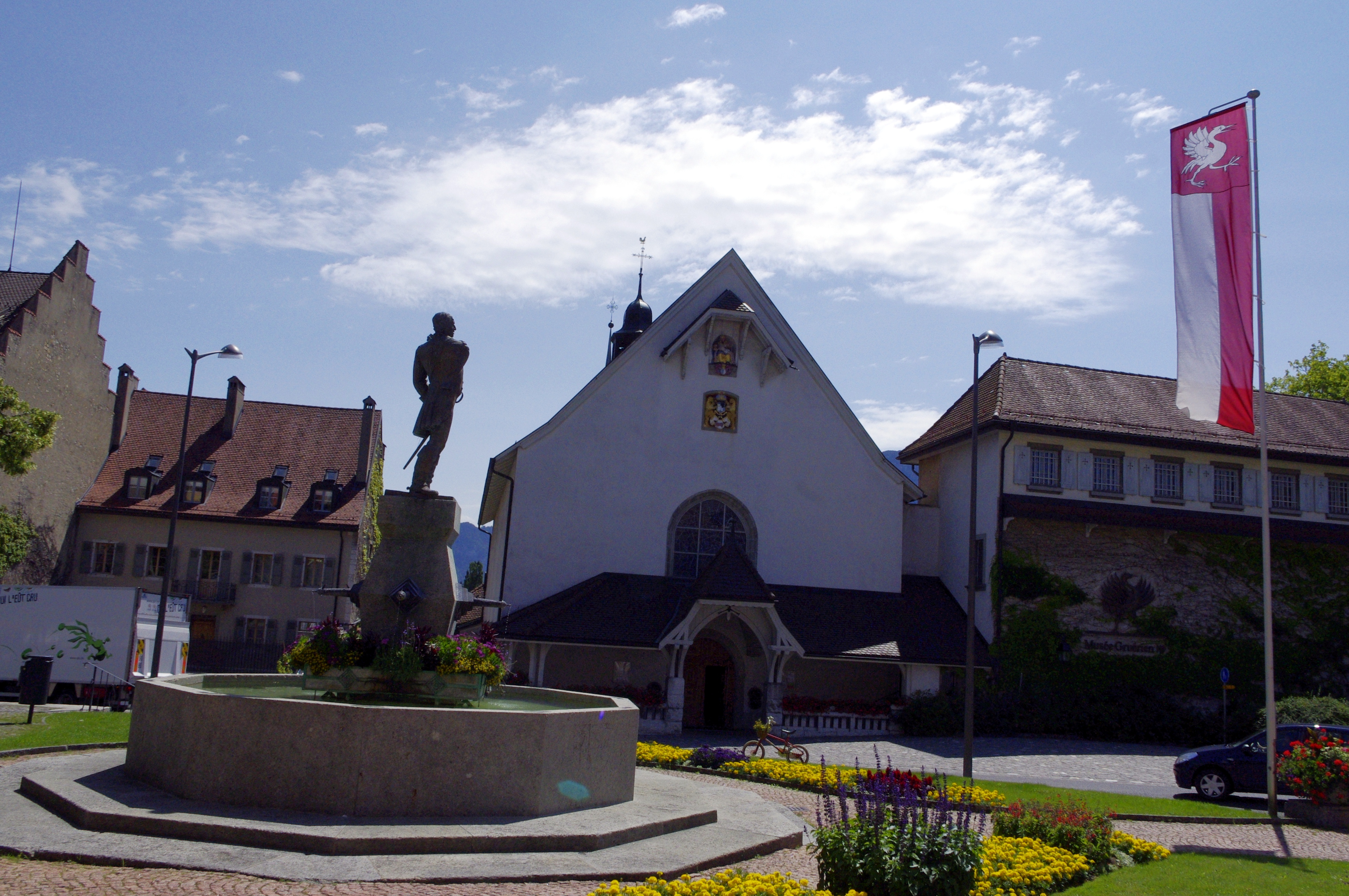 Bulle, Suisse